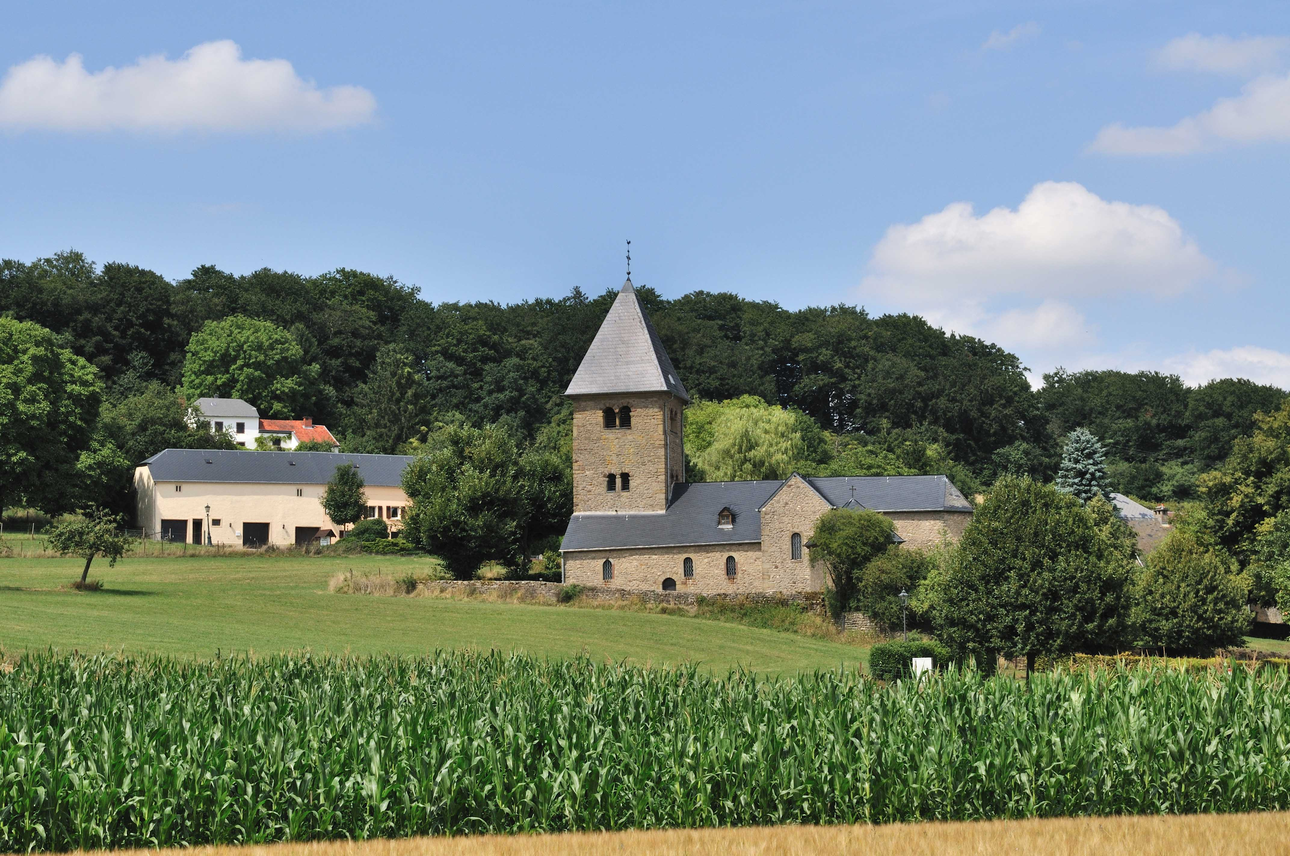 Giischterklaus 2008. Kategorie:Gemeng Rouspert